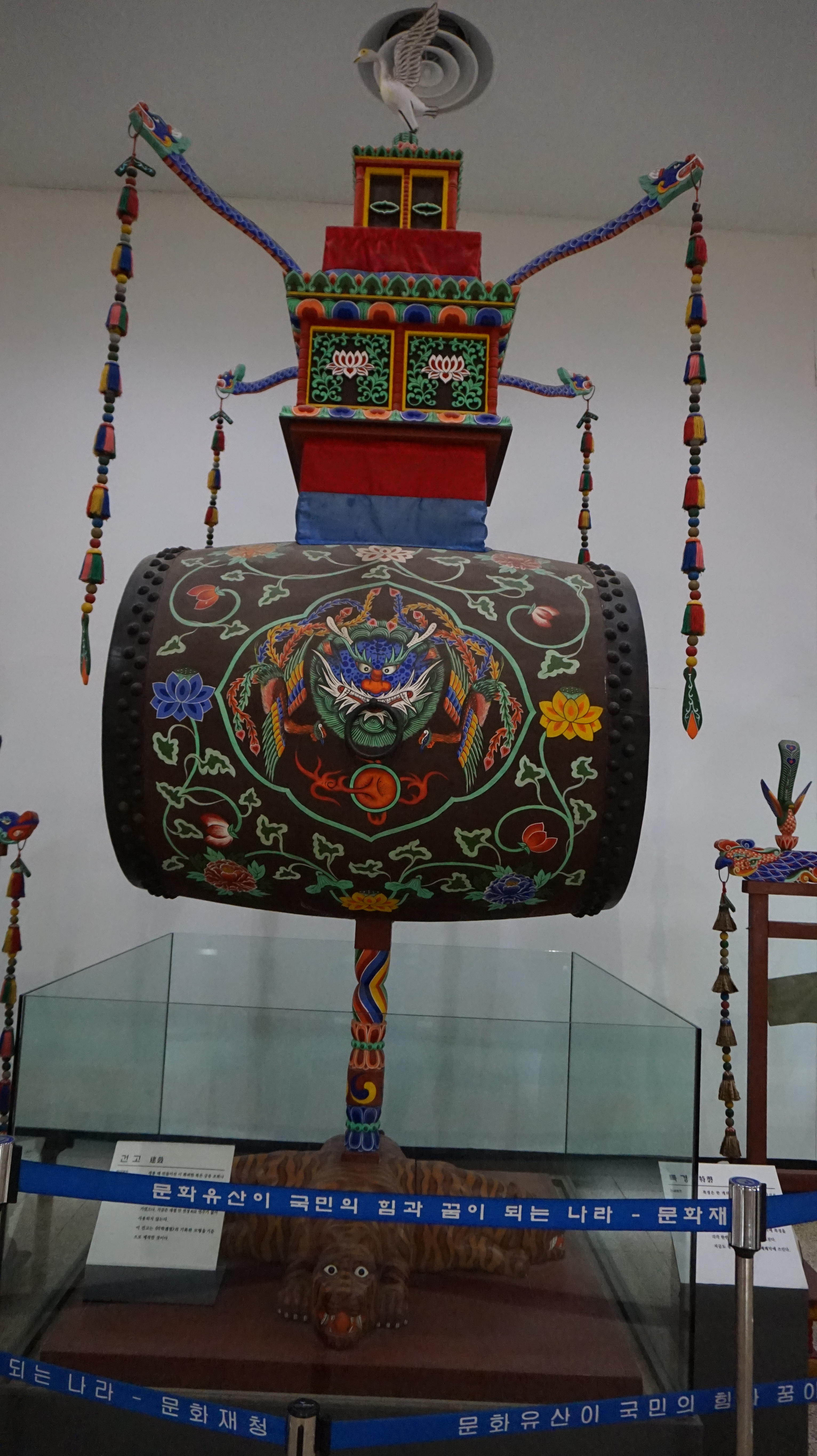 건고 (1)